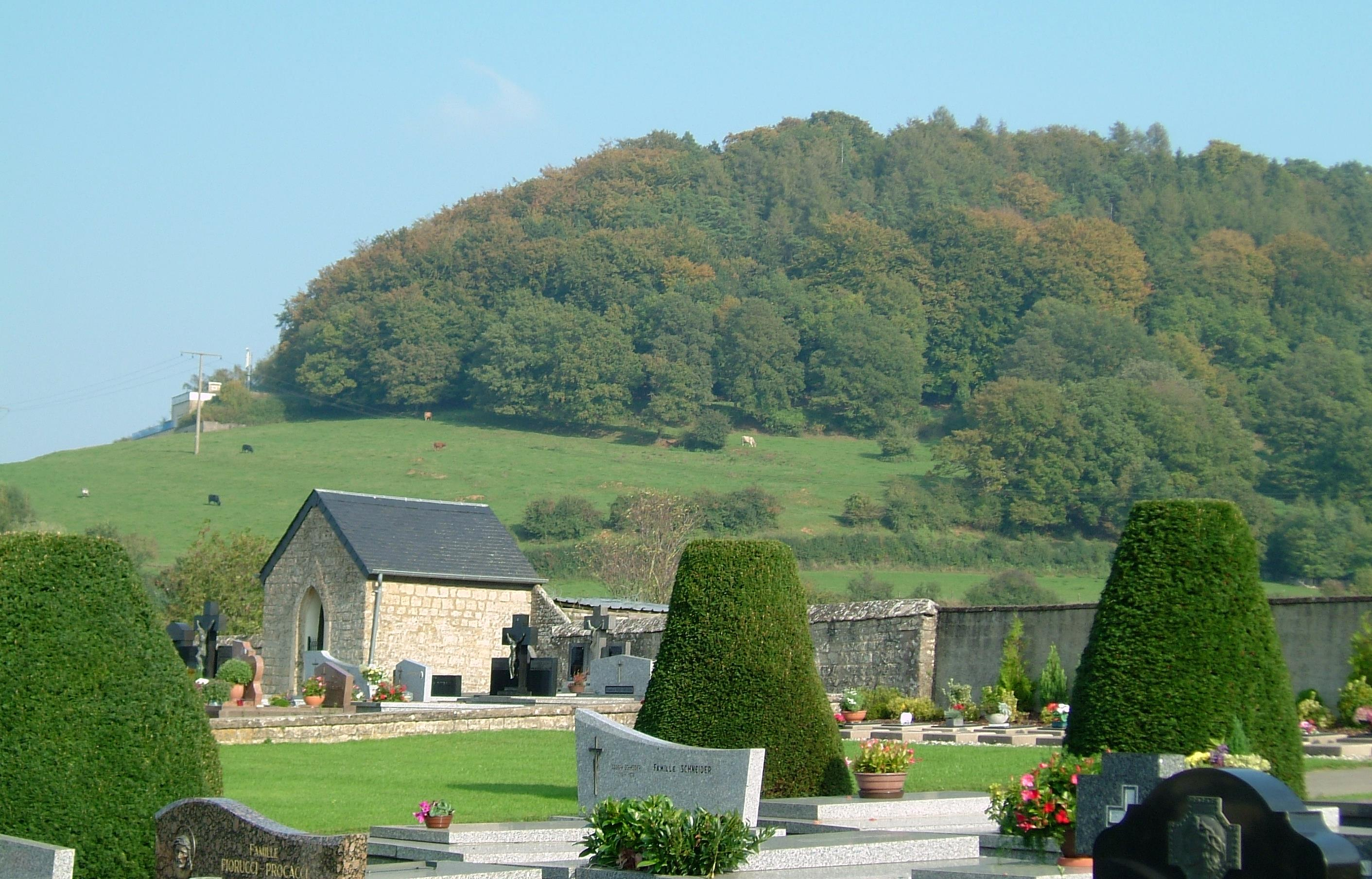 Kalebierg an der Gemeng Keel